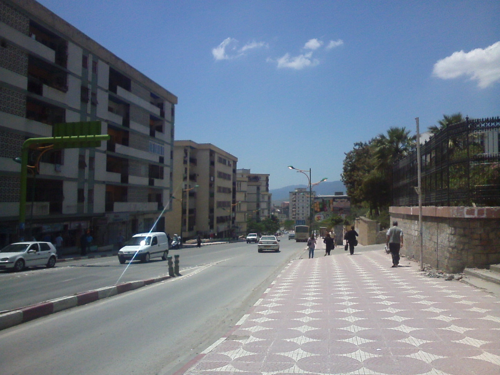 La rue Larbi Ben M'Hidi et la cité 20 Août 1955 à gauche, en plein centre-ville de Tizi Ouzou.